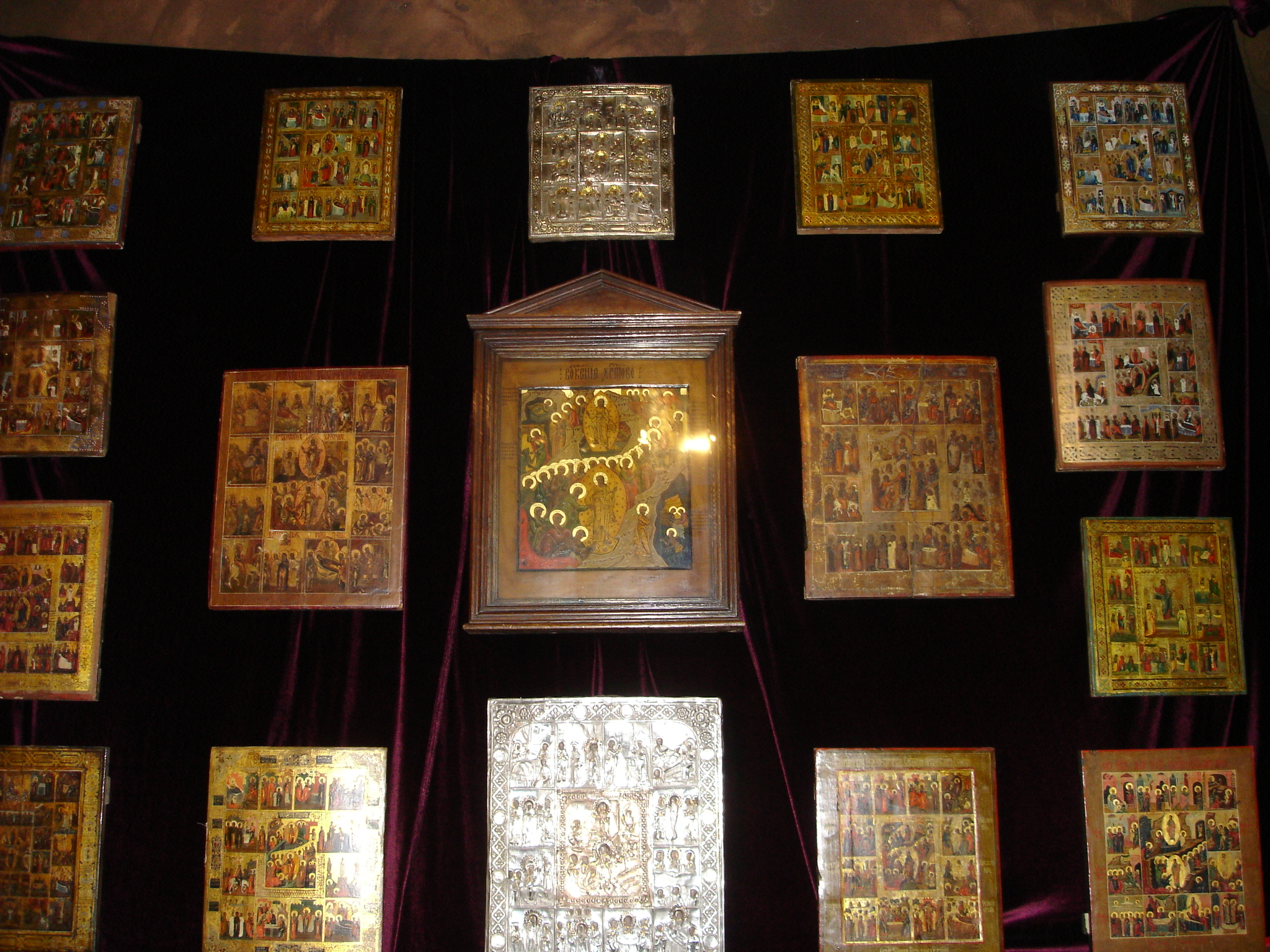 Ikony 12 najważniejszych świąt liturgicznych w supraskim Muzeum Ikon